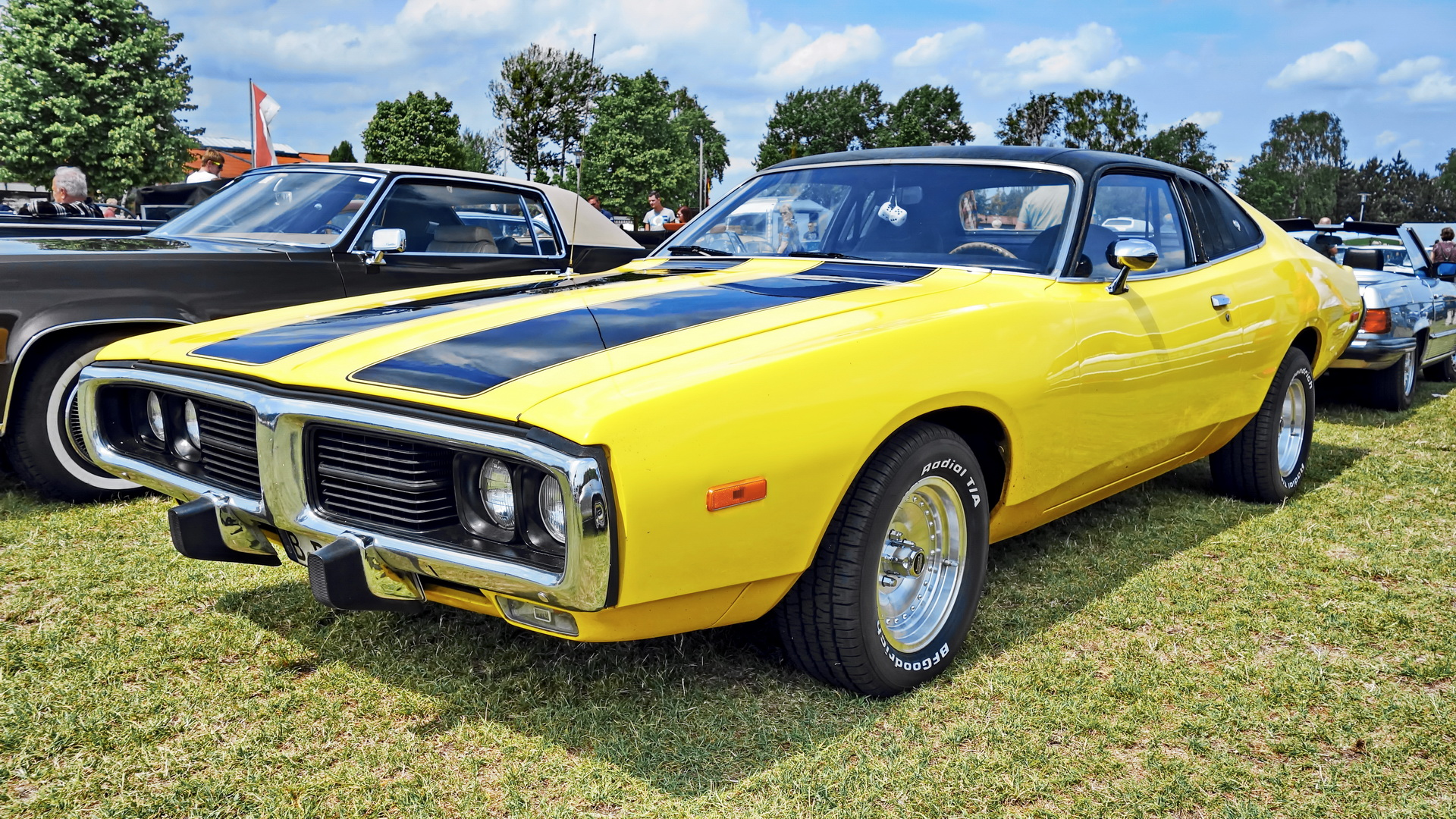 Dodge Charger Mk3